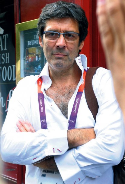 Mile Isakovic